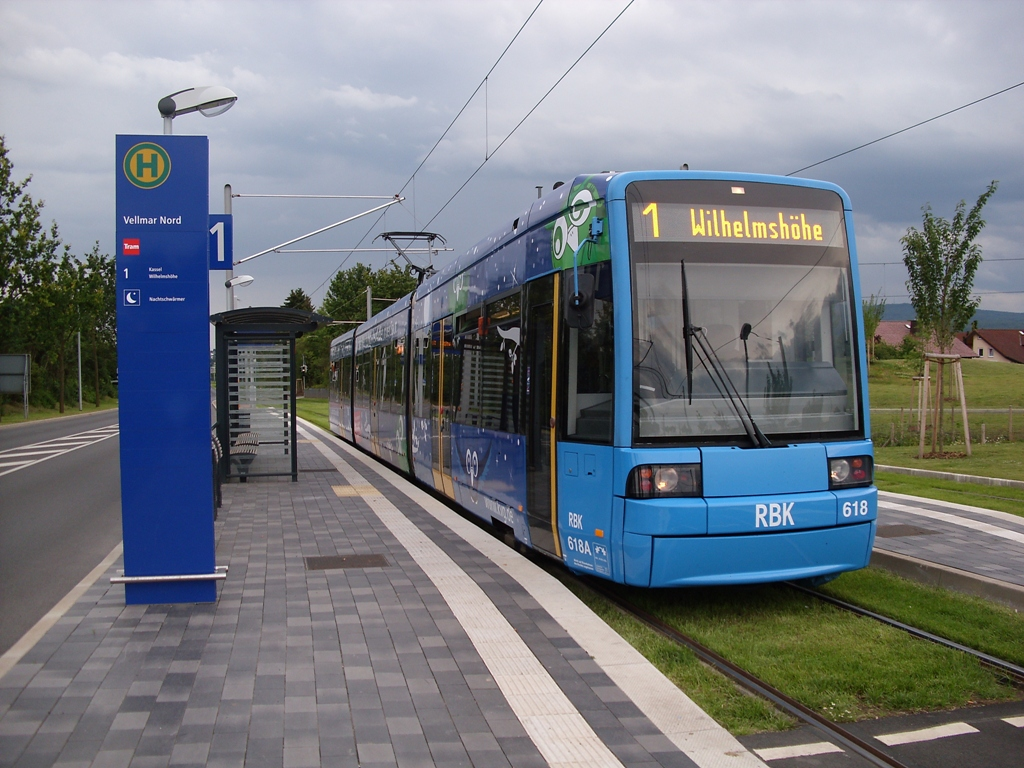 Tram #618 der RBK am 18.07.2012 in der Endhaltestelle Vellmar Nord.